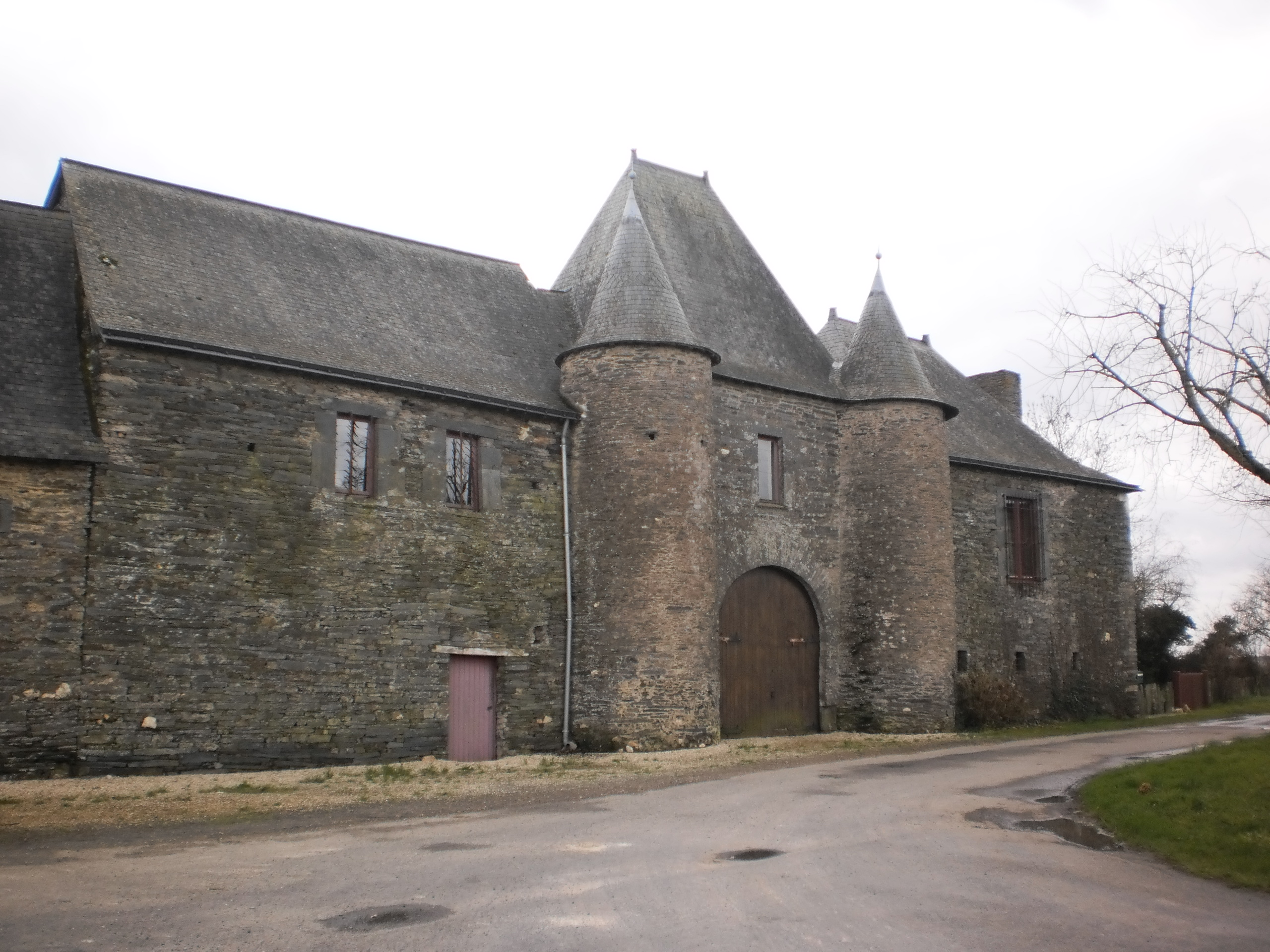 Grand-Auverné (Loire-Atlantique, France) - manoir de la Petite-Haie